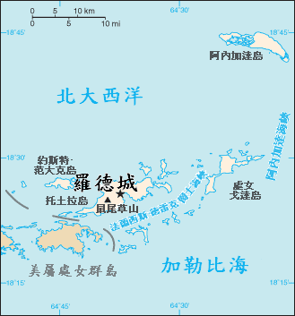 描述摘要}